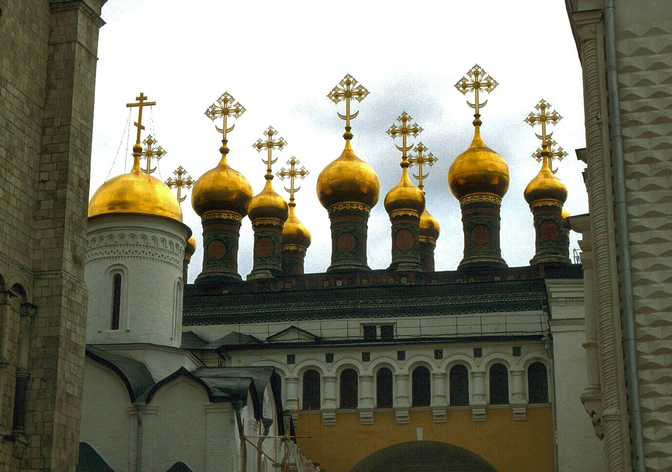 Верхоспасский собор и Золотая царицына палата